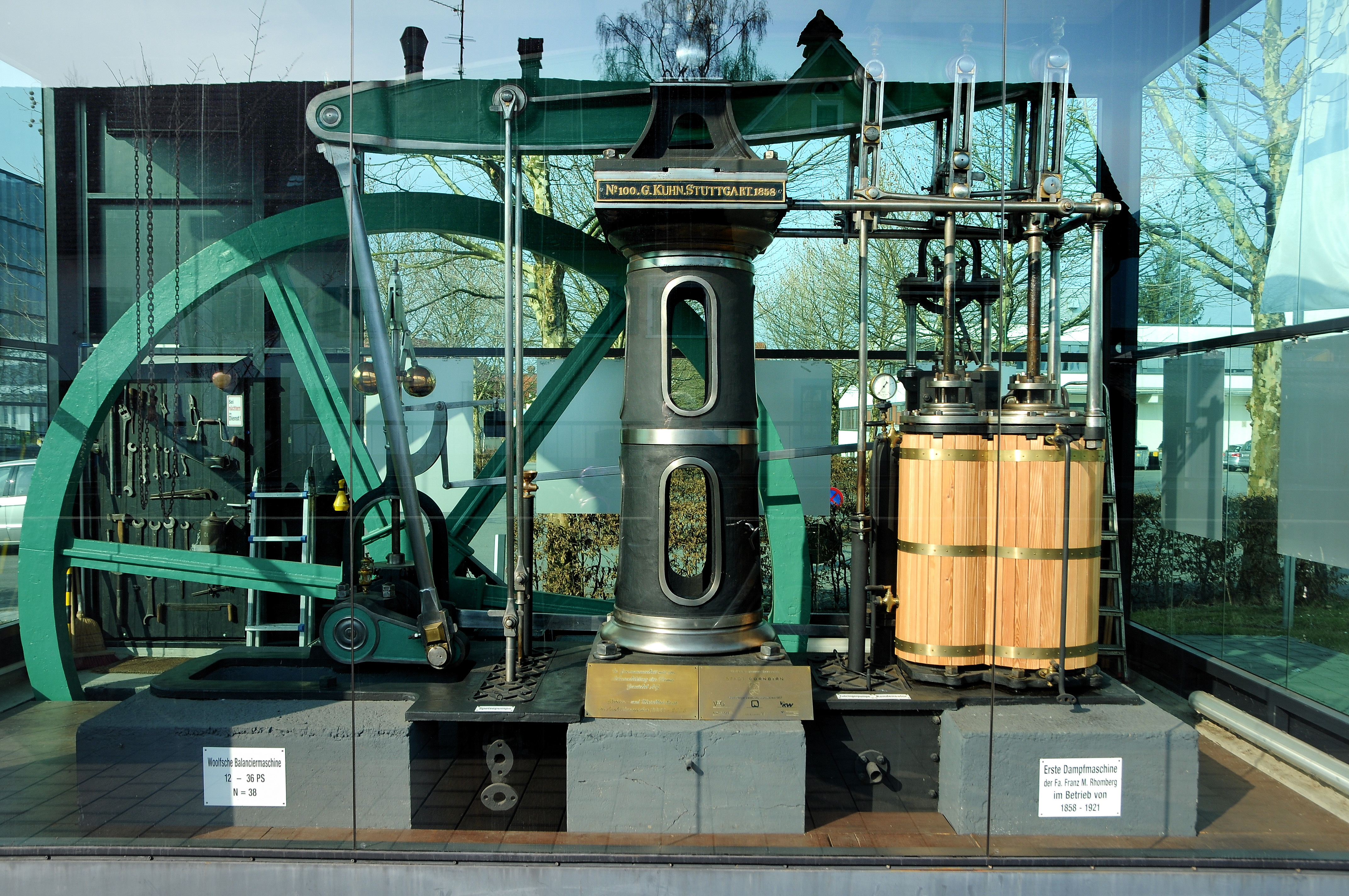 Die Abbildung zeigt eine von James Watt entworfene, doppelt wirkende Niederdruckdampfmaschine mit Balancier (Woolfsche Balanciermaschine). Die Maschine wurde 1858 von der Firma G.Kuhn in Stuttgart gebaut. Sie war die erste Dampfmaschine der Fa. Franz M.Rhomberg, in Betrieb von 1858-1921 in Dornbirn. Daten der Maschine: ca.12-36PS, Dampfdruck von 3,5-5,5atü, Drehzahl ca.35U/min, Zylinderinhalt: Hochdruckzylinder Durchmesser 255mm, Hub 677mm Zylinderinhalt 33,21l; Niederdruckzylinder Durchmesser 435mm, Hub 900mm Zylinderinhalt 133,68l. Info Das Objekt steht unter Denkmalschutz. [1].